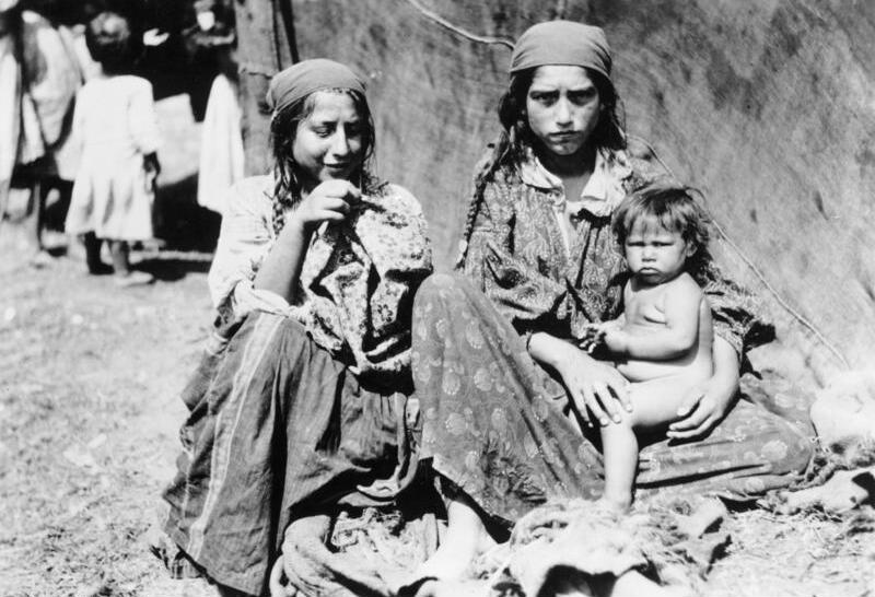 Zigeunerinnen mit Kind. 1928. 28 731-28